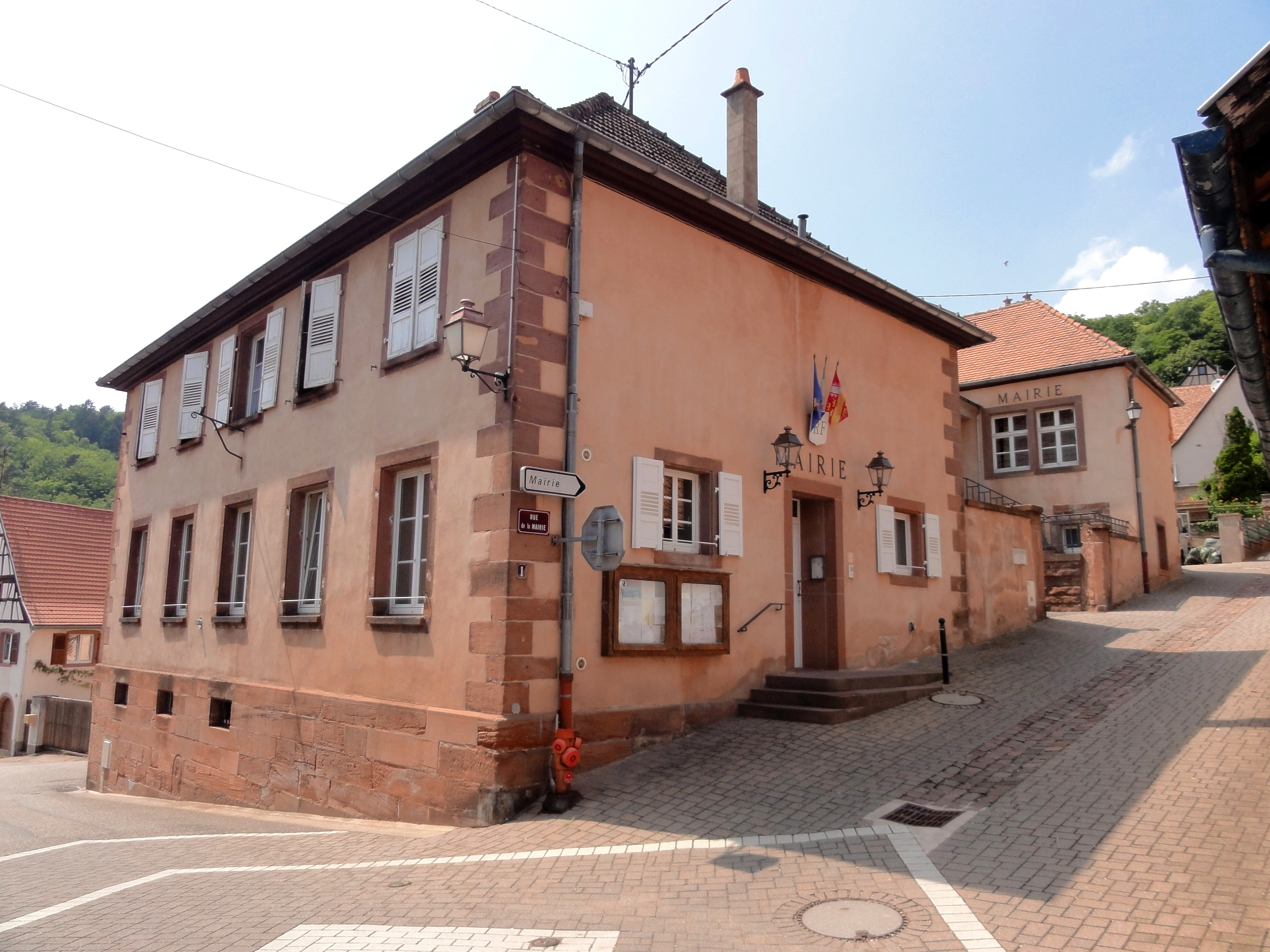 Alsace, Bas-Rhin, Saint-Jean-Saverne, Mairie, 1 rue de la Mairie.